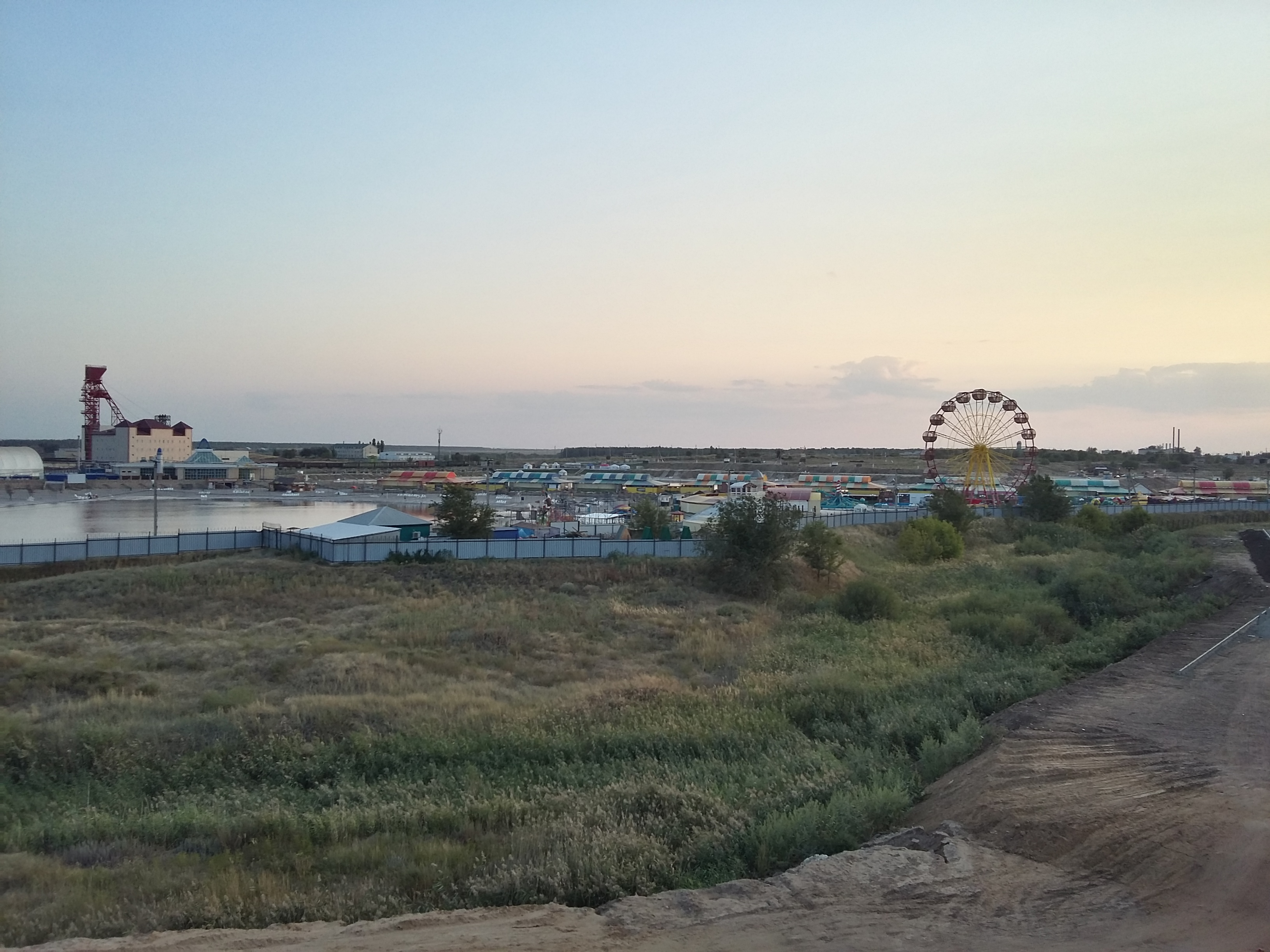 Вид на курорт г.Соль-Илецк